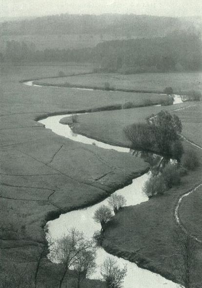 Originalbeschreibung: Bei Fallingbostel im Böhmetal. Überall Rieselwiesen